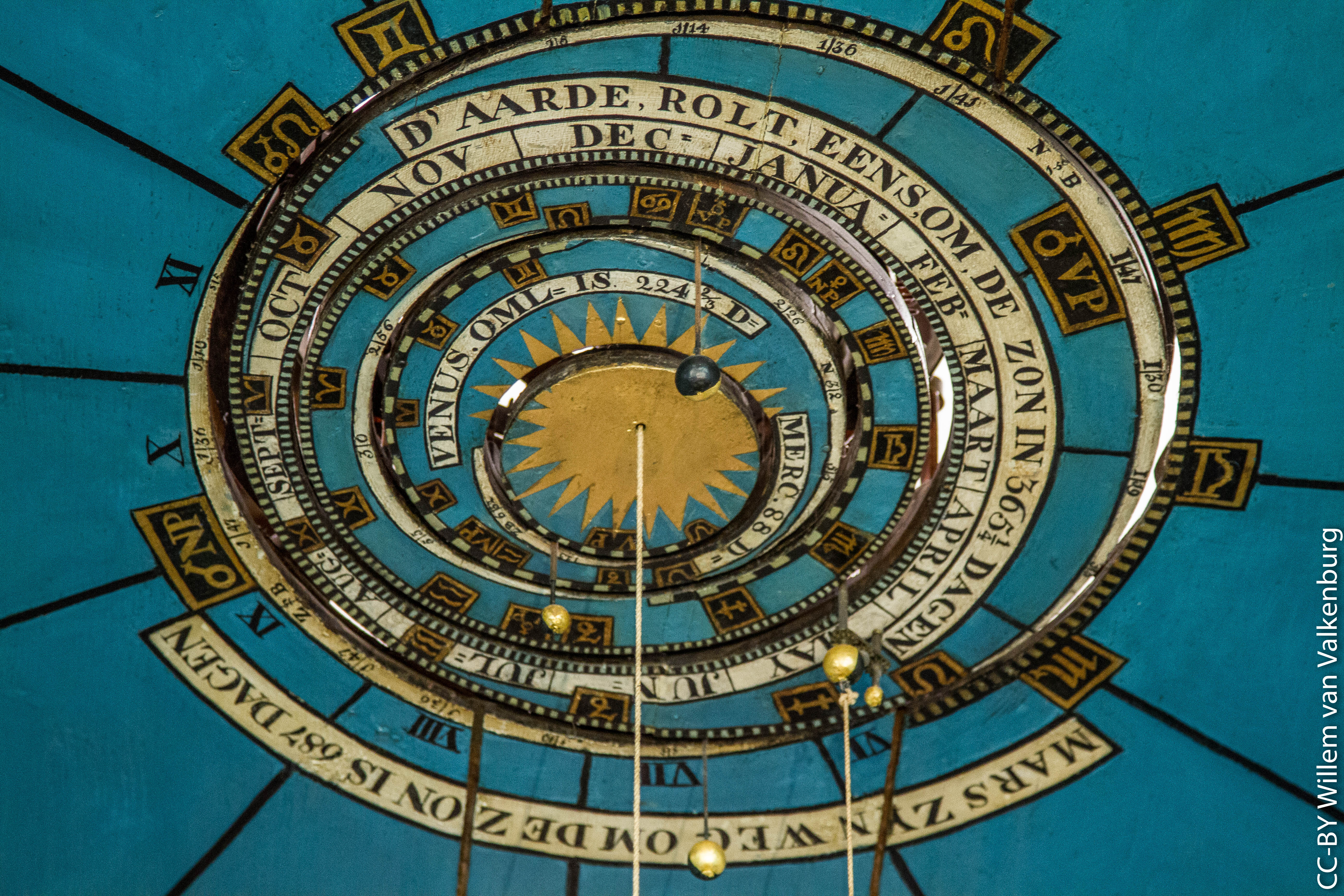 Eise Eisinga Planetarium in Franeker